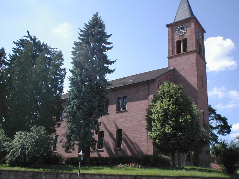 Evangelische Kirche in Epfenbach